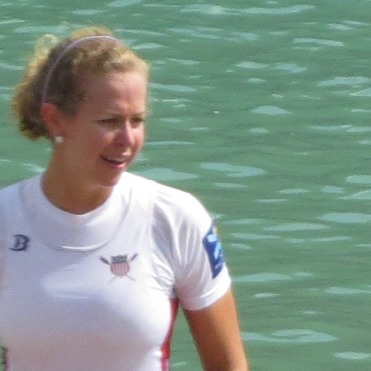 Bateaux en finale du W4- USA : O'BRIEN, Kristine LATZ, Grace MARTELLI, Adrienne LUCZAK, Grace